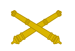 Distintivo do Quadro de Material Bélico do Exército